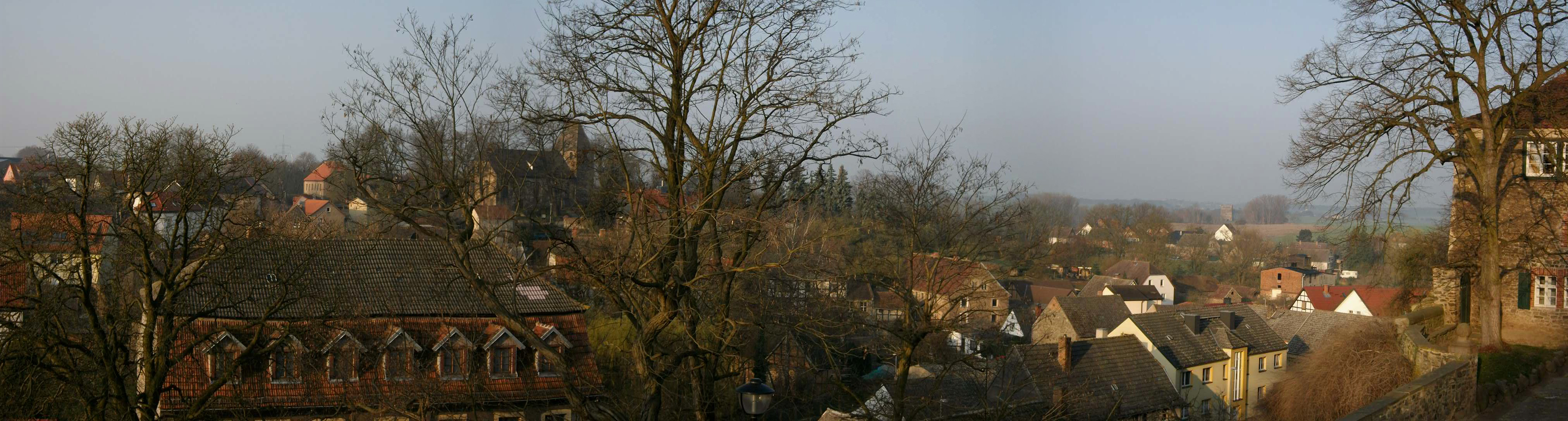 Vom Schloss aus Panorama über Hundisburg